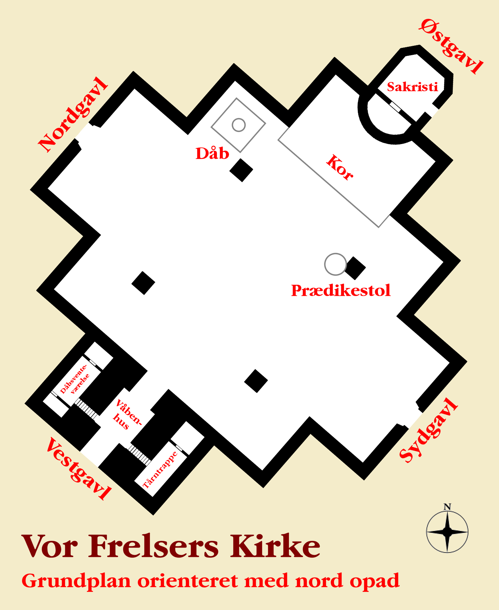 Vor Frelser Kirke (Church of Our Saviour), Copenhagen, Denmark. Plan drawing.